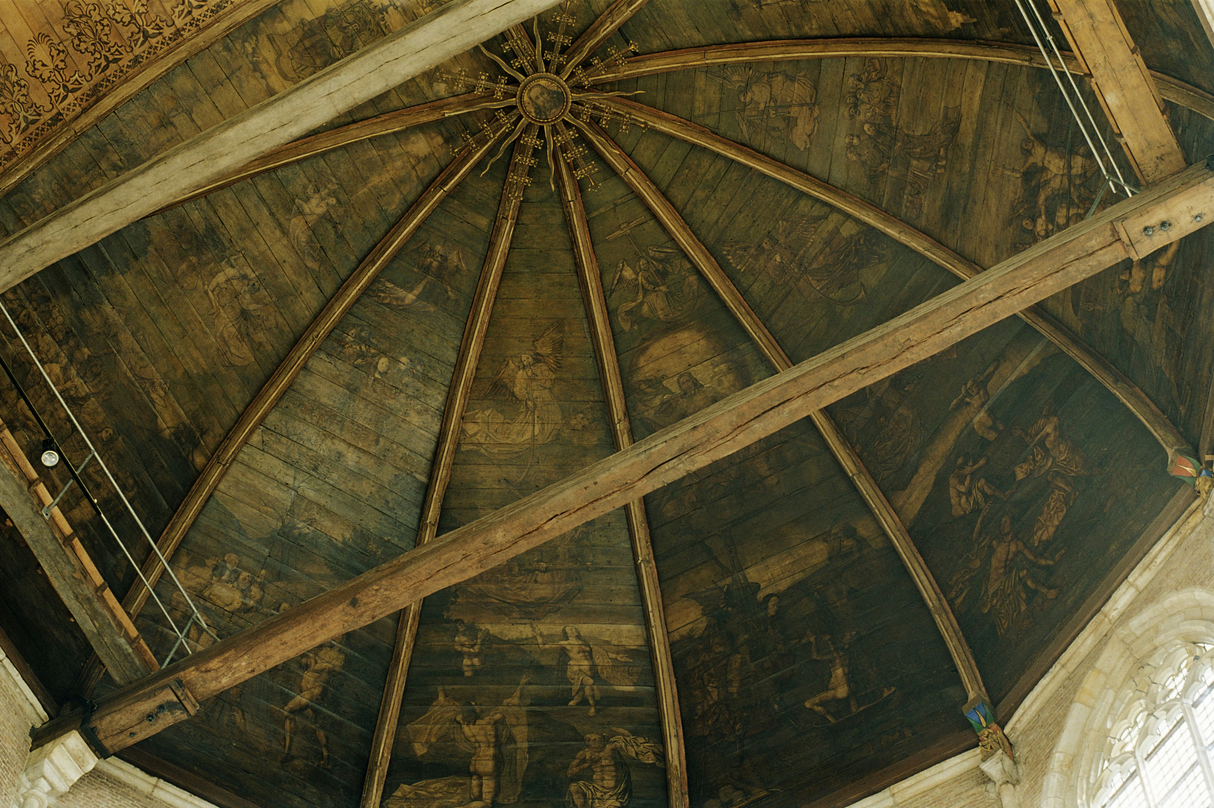 Grote Sint Laurenskerk: Interieur, plafondbeschildering boven het koor (opmerking: Gefotografeerd voor Kanjers eerste ronde)